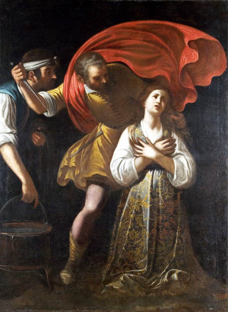 Martirio de Santa Lucía, Palazzo Bellomo